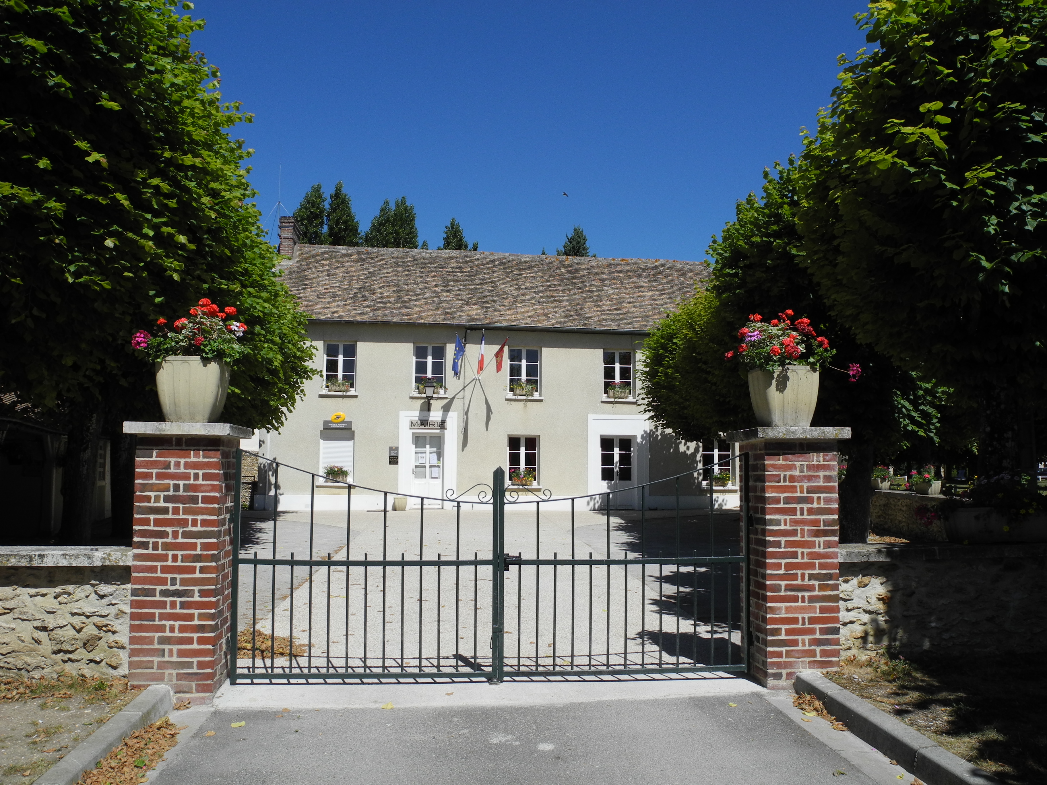 La mairie d'Houlbec-Cocherel (Eure)